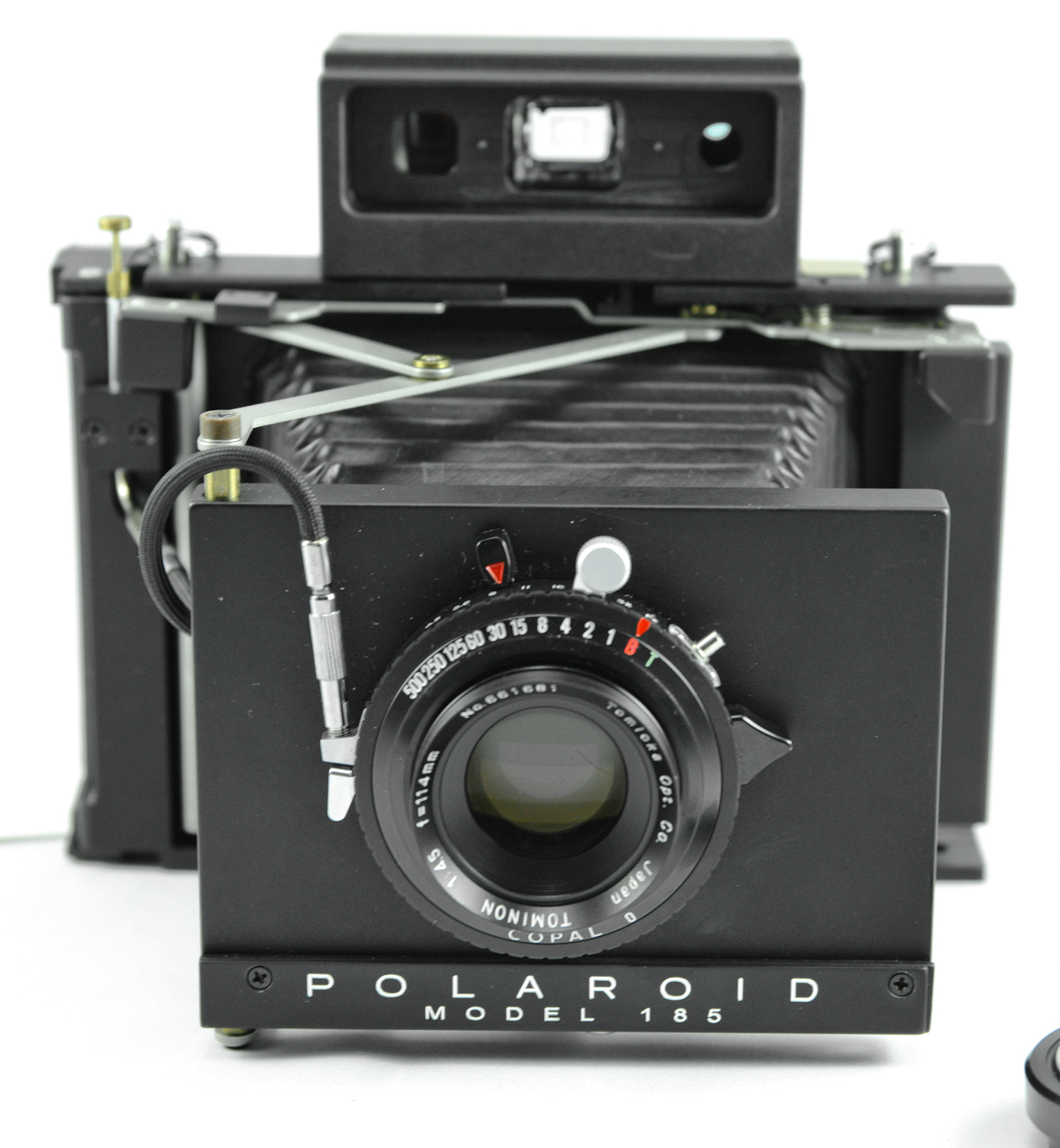 0361 Polaroid 185 2000